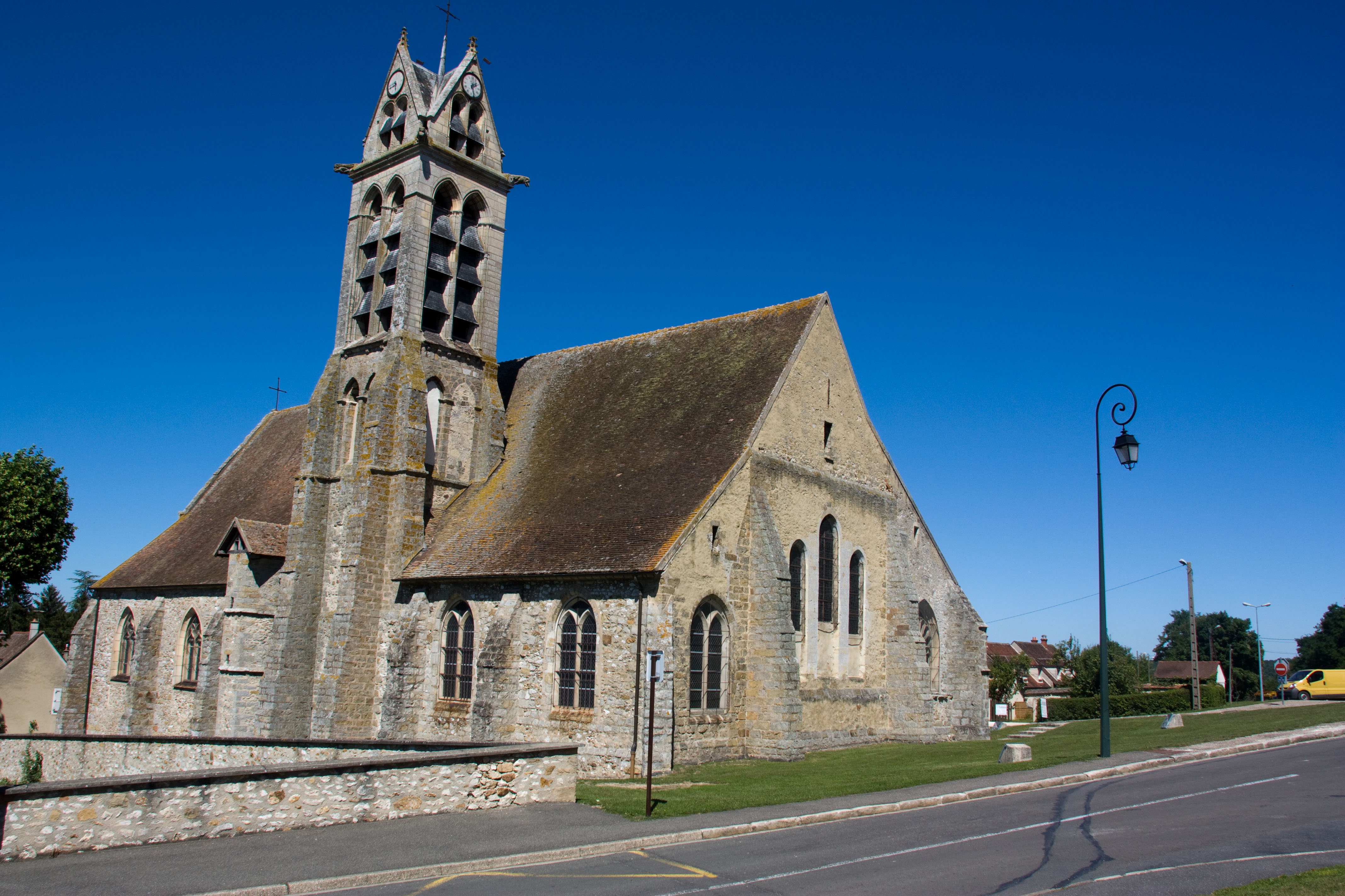 Église Sainte-Geneviève d'Héricy, Seine-et-Marne, France